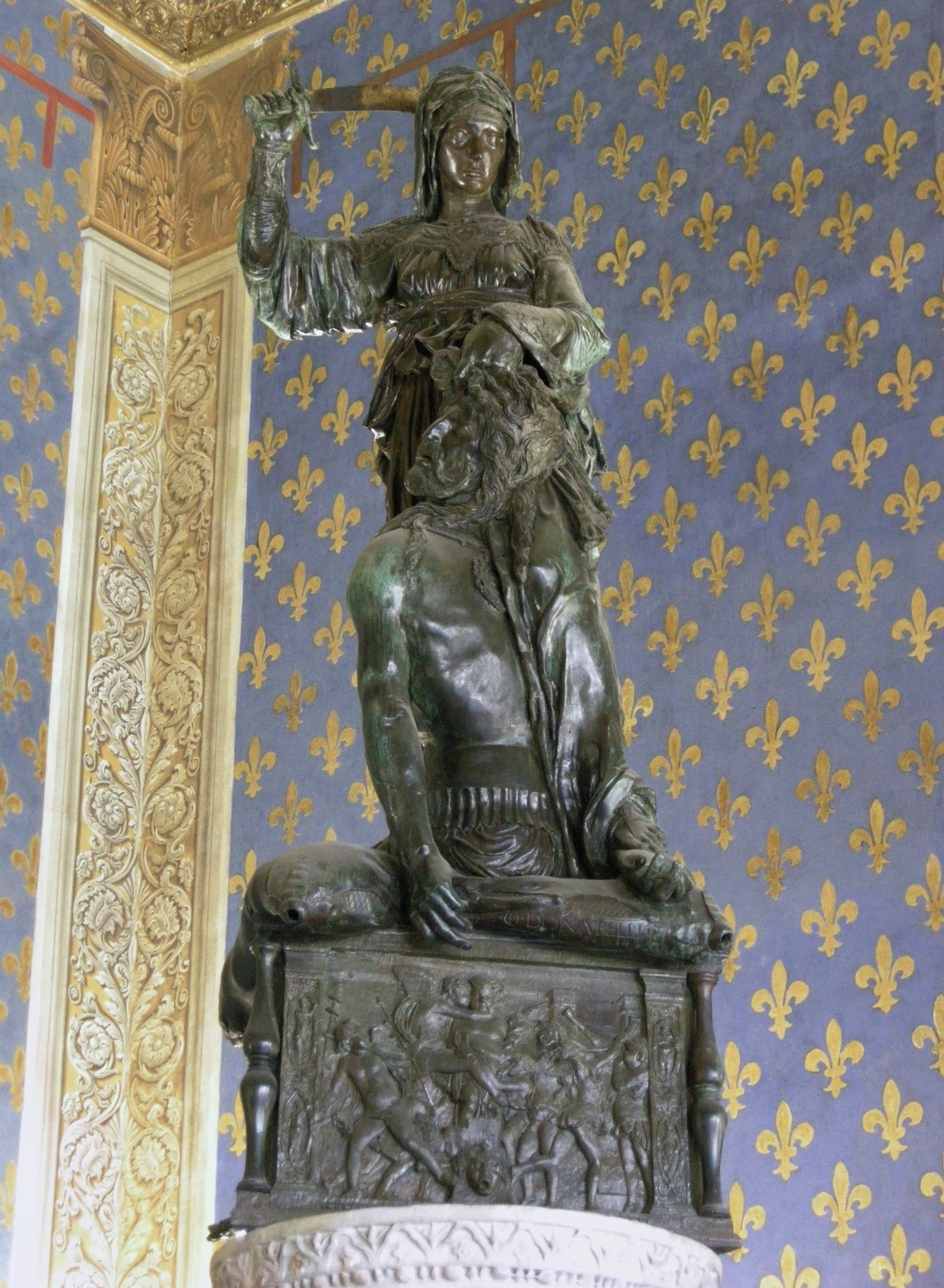 Sala dei gigli, giuditta e oloferne